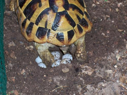 Deposizione uova, Testudo hermanno boettgeri, Brescia Italy